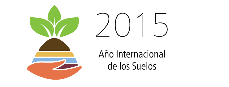 Logotipo del Año Internacional de los Suelos 2015 en español